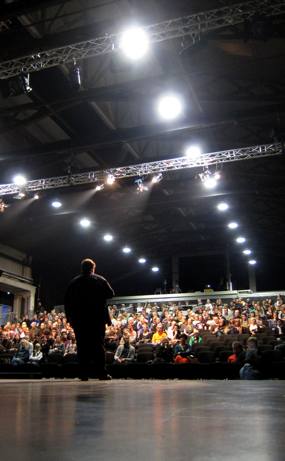 Jarmo Puskala puhuu Logomolla 8.10.2011